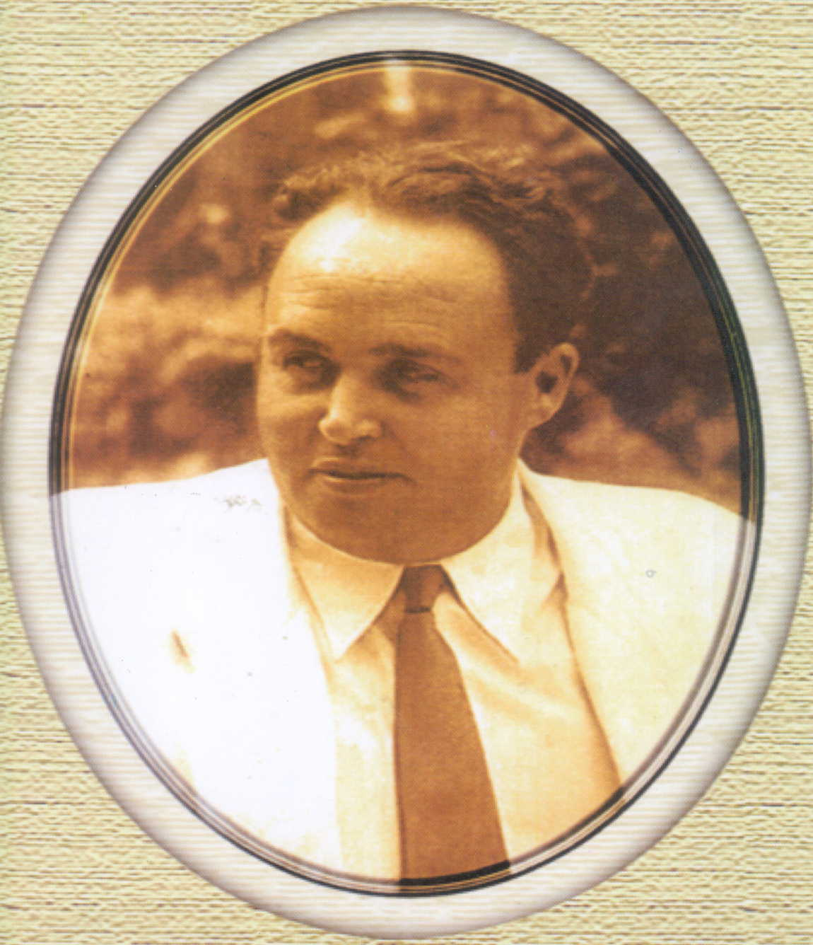 Salah Azaïz